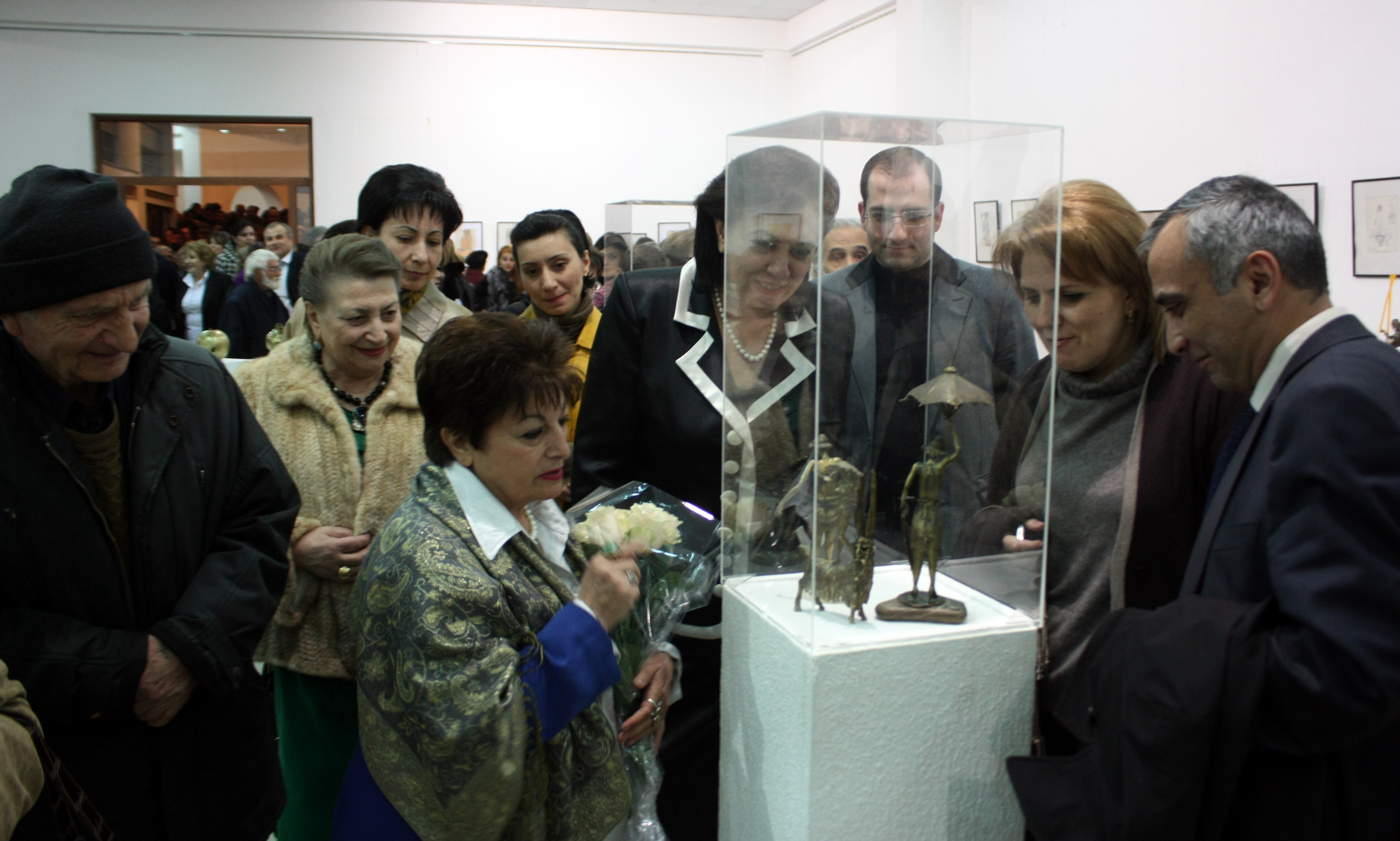 Նկարչուհի-ձևավորող Արև Պետրոսյան